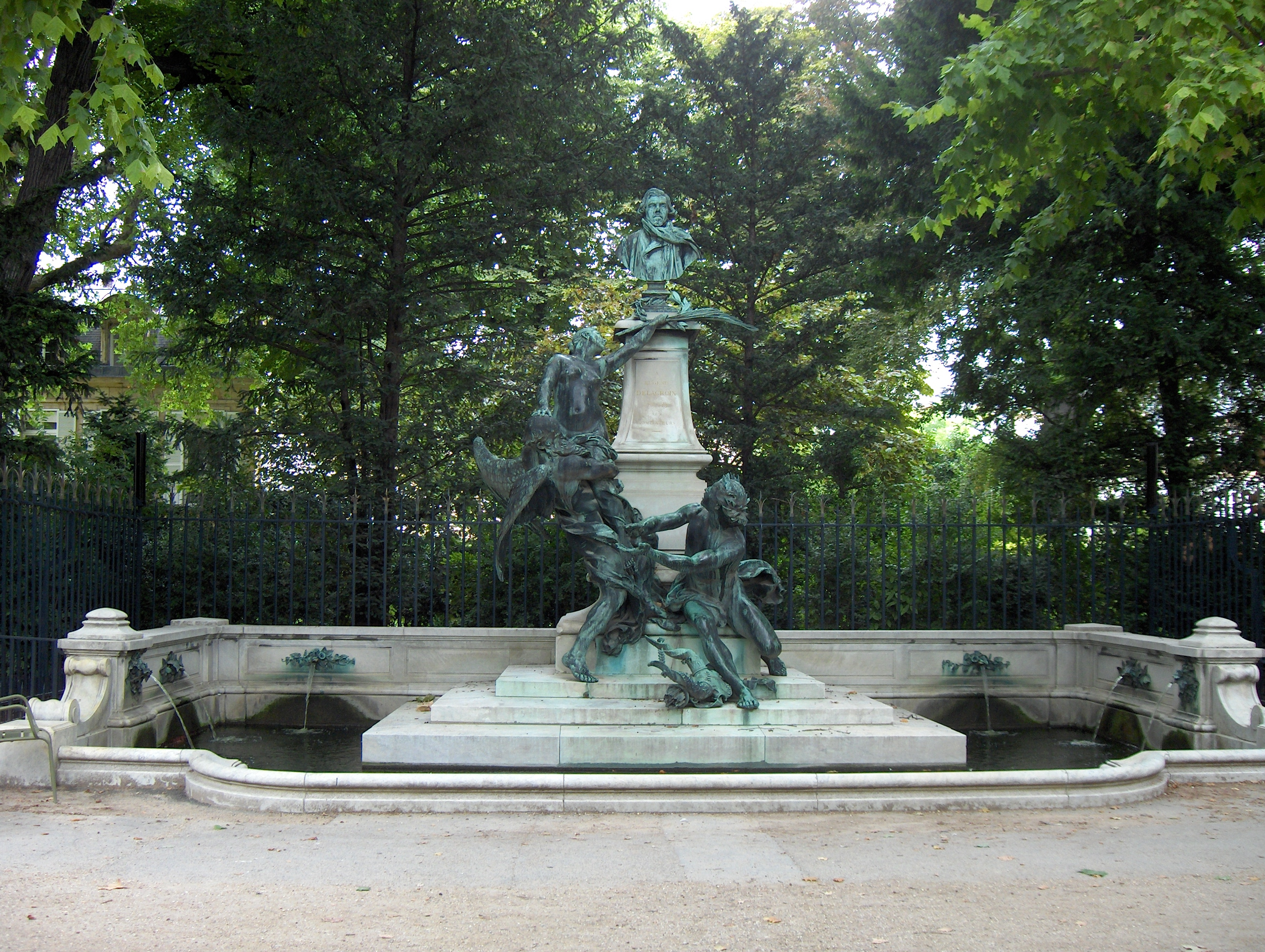 Monument à Eugène Delacroix par Jules Dalou, Jardin du Luxembourg, Paris 6eme